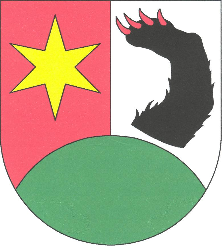 Znak obce Veselé